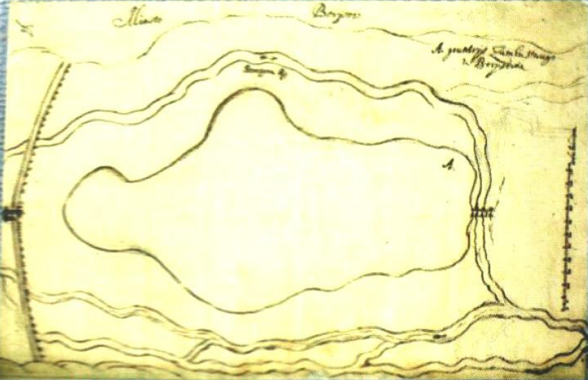 Беларуская (тарашкевіца): Барысаў (Barysaŭ). Плян места